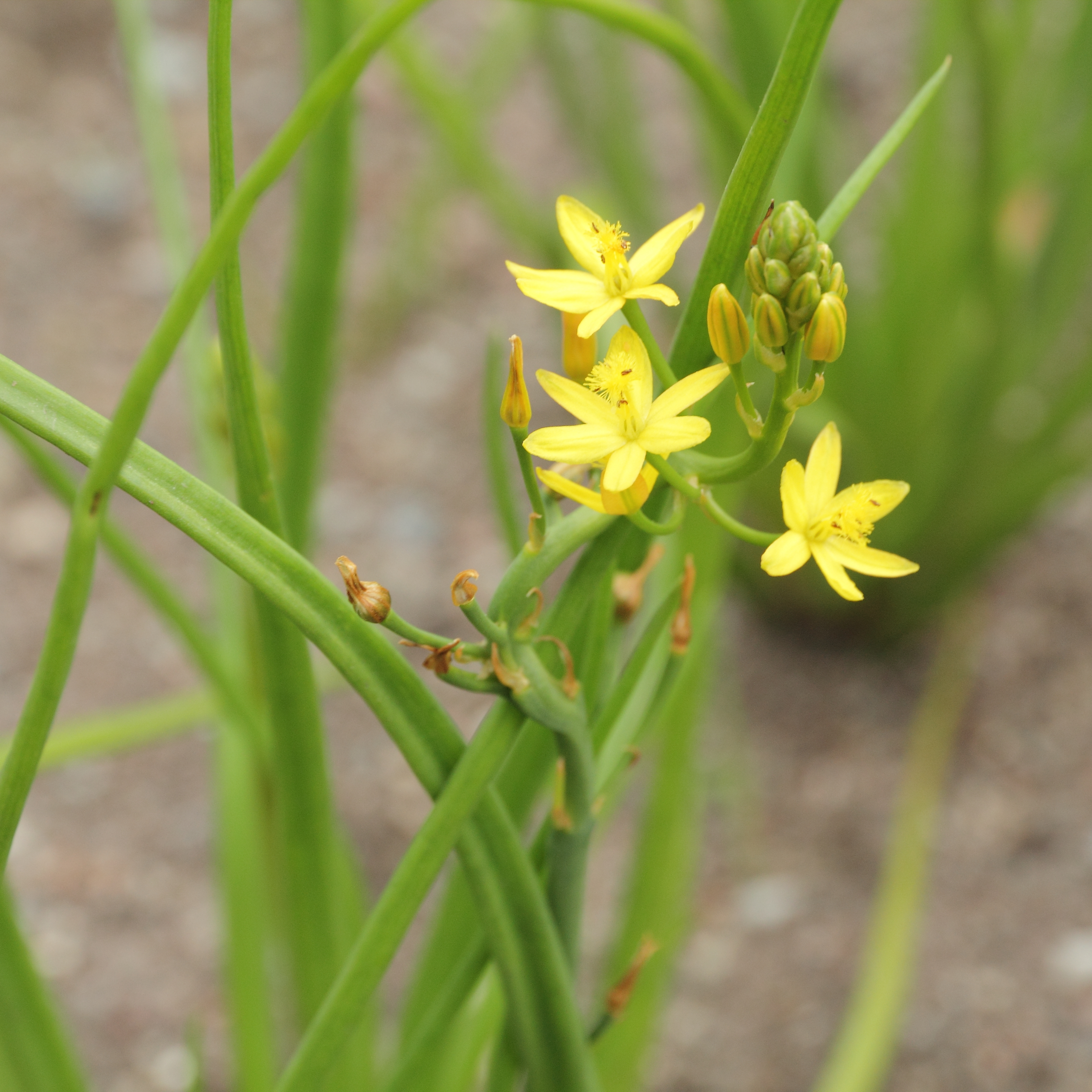 Bulbine semibarbata i Bergianska trädgården.